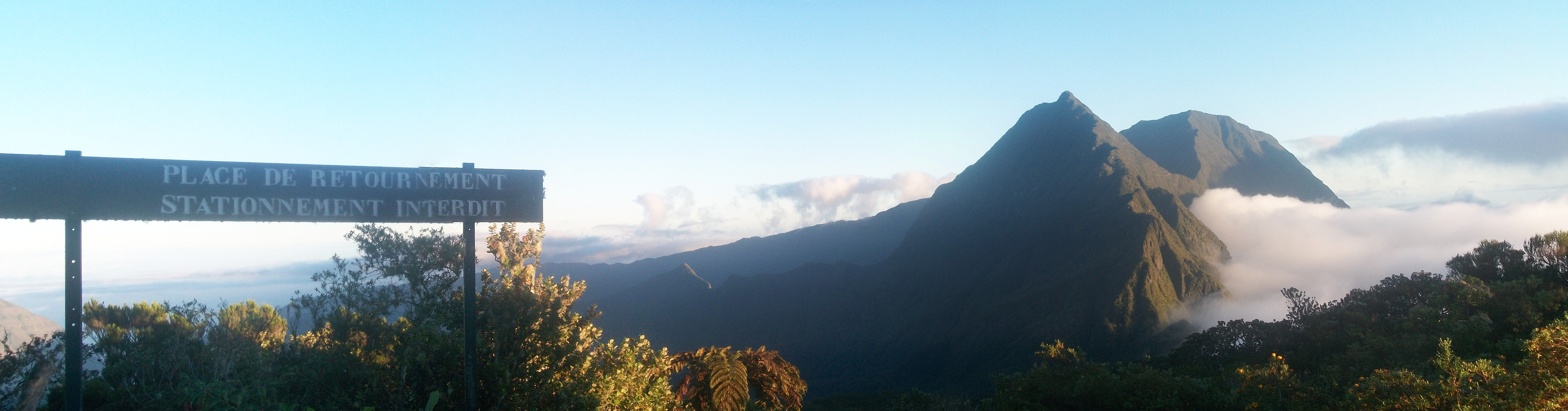 vue sur le cimendef